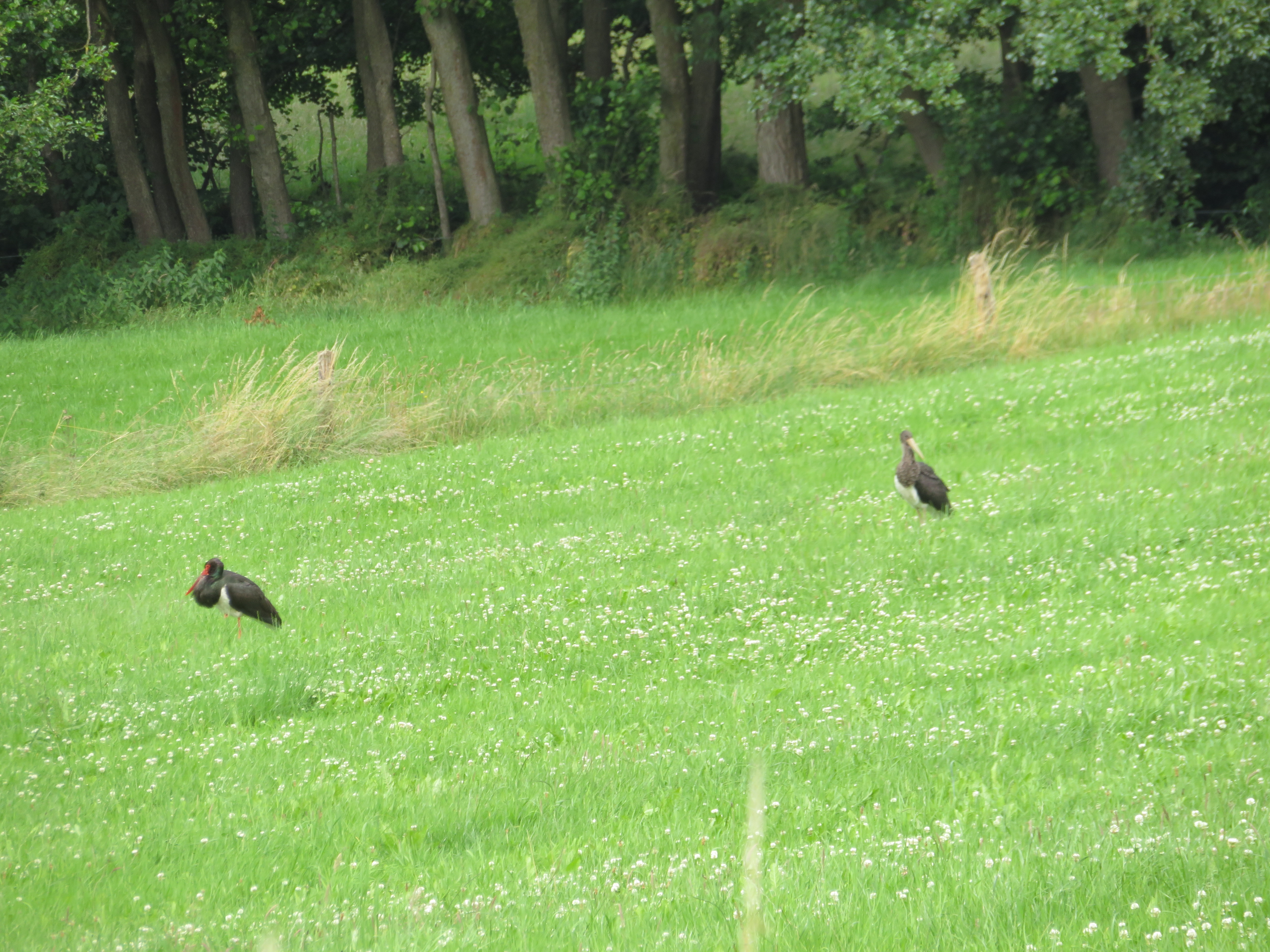 Zwei Schwarzstörche, links Altvogel und rechts Jungvogel, im Landschaftsschutzgebiet Talraum der Milmke.​